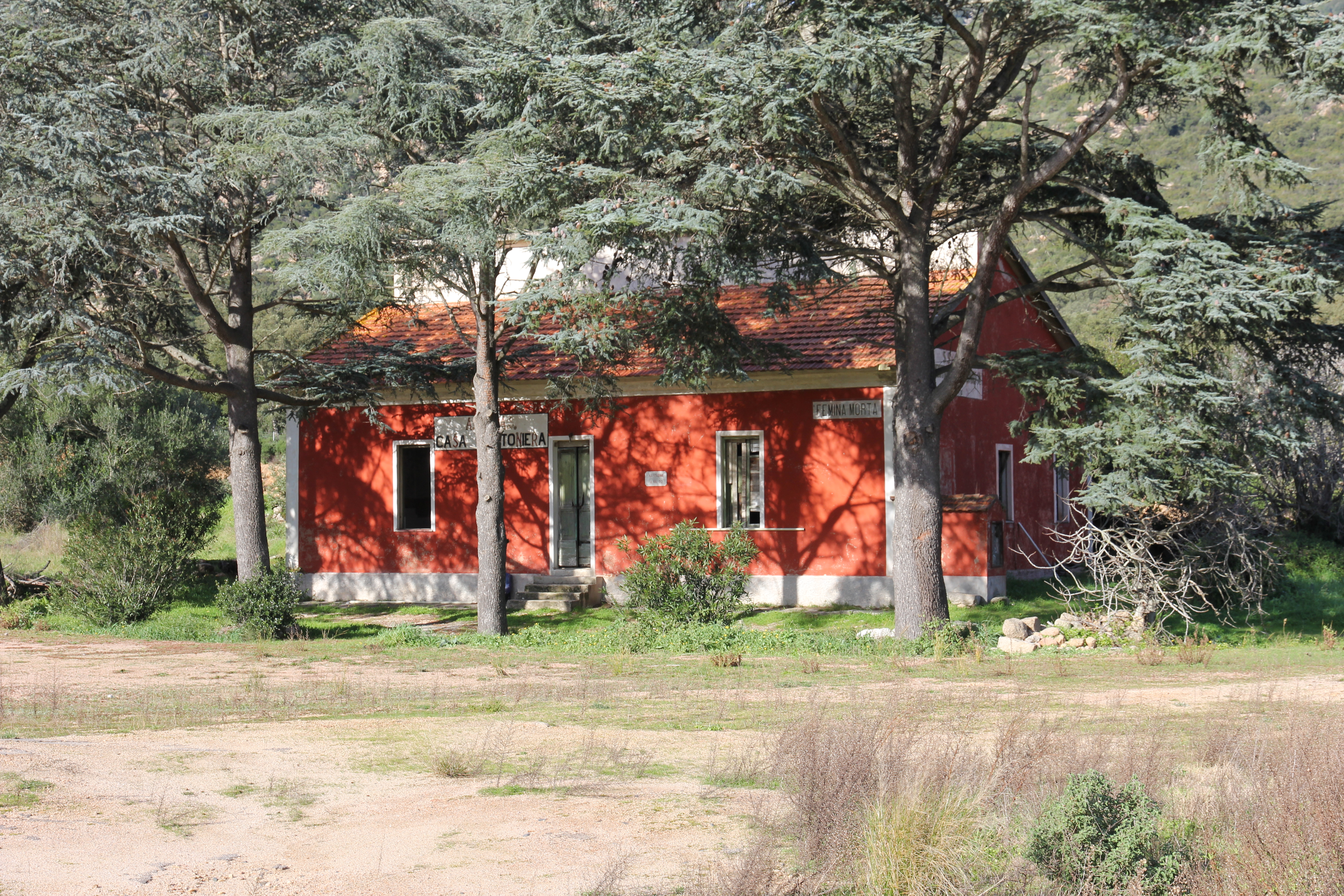 Bortigiadas - Casa cantoniera di Femina Morta